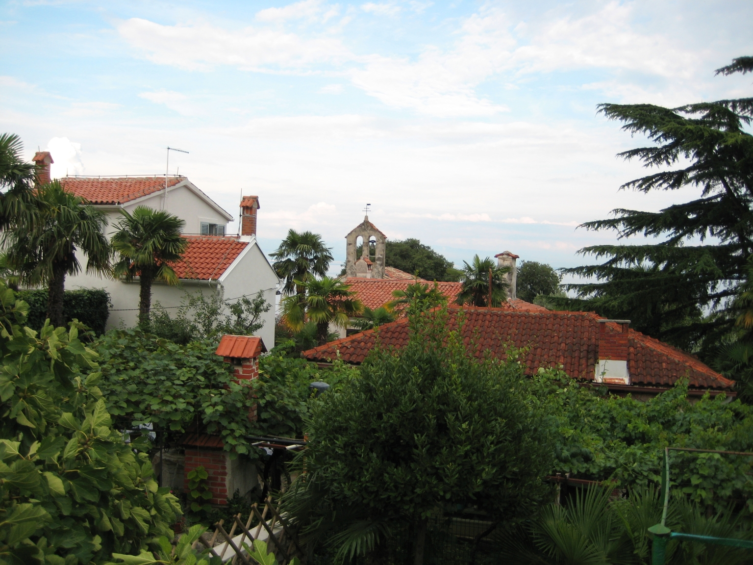 Donji Kraj kod Mošćenićke Drage